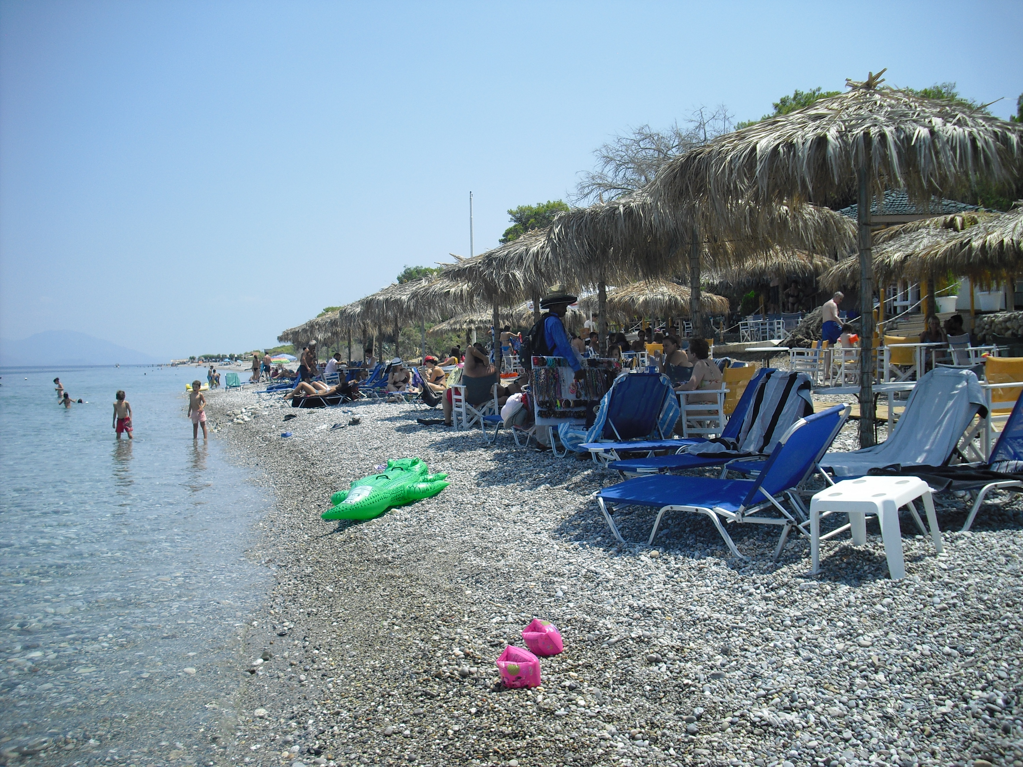 Platja del poble grec de Xylokastro.